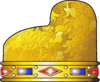 Doges of Venice hat / mitra doży weneckiego